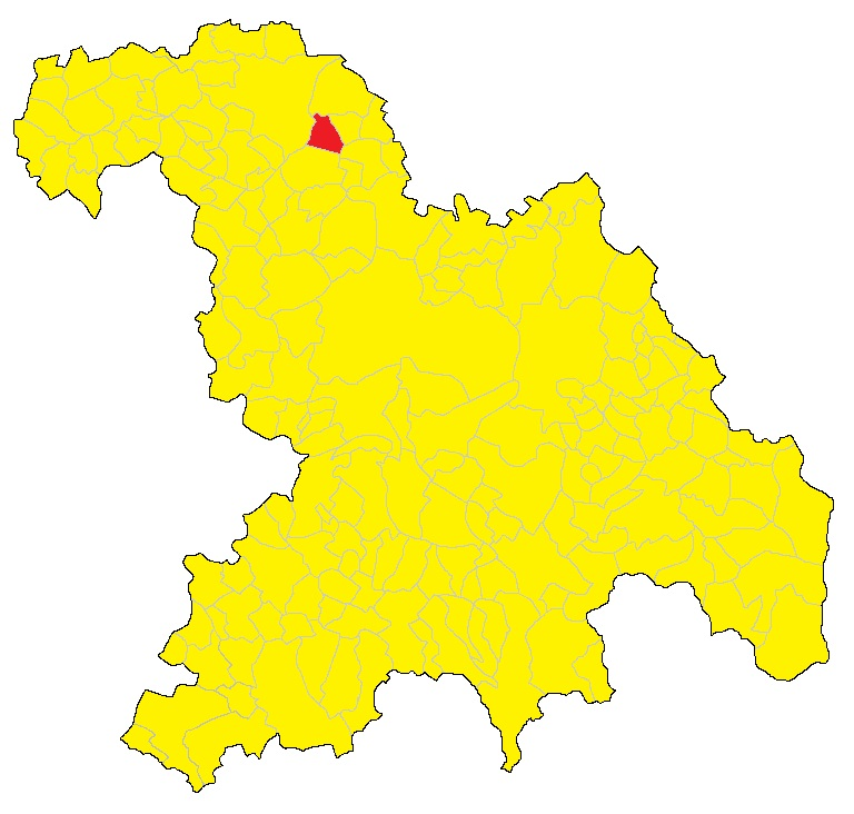 Mappa del comune di Borgo San Martino (AL).